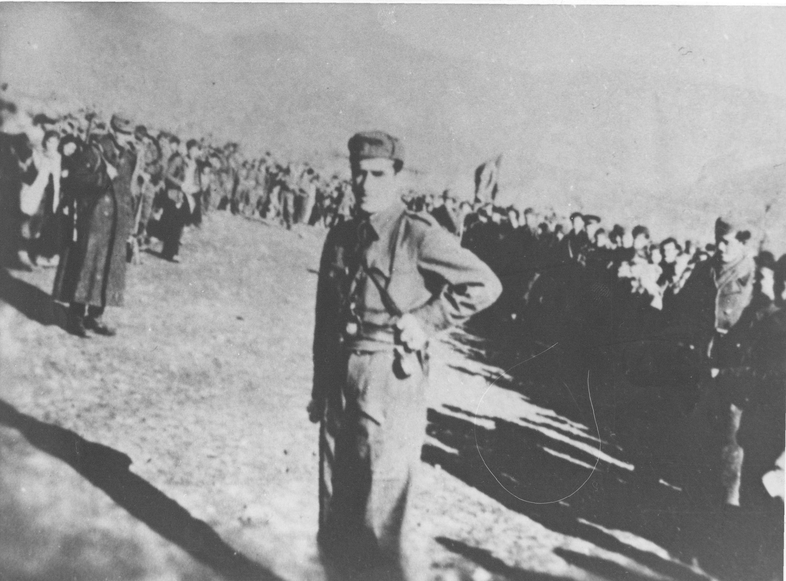 Srpskohrvatski / српскохрватски: Cvetko Uzunovski Abas govori borcima 2. makedonske udarne brigade prilikom njenog formiranja u selu Fuštanji - Egejska Makedonija, 20.XII 1943.godine.